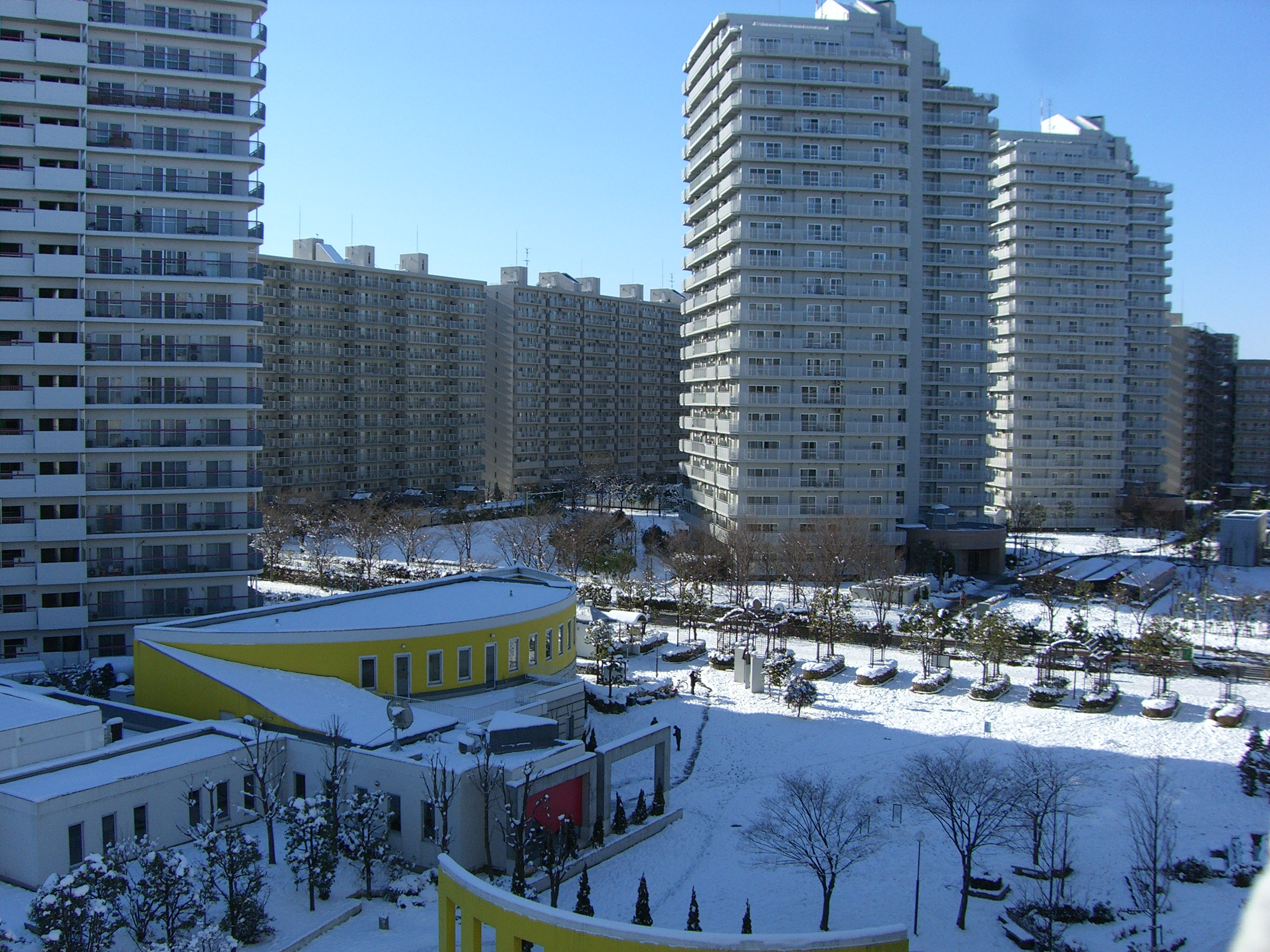 雪化粧のさつき平団地